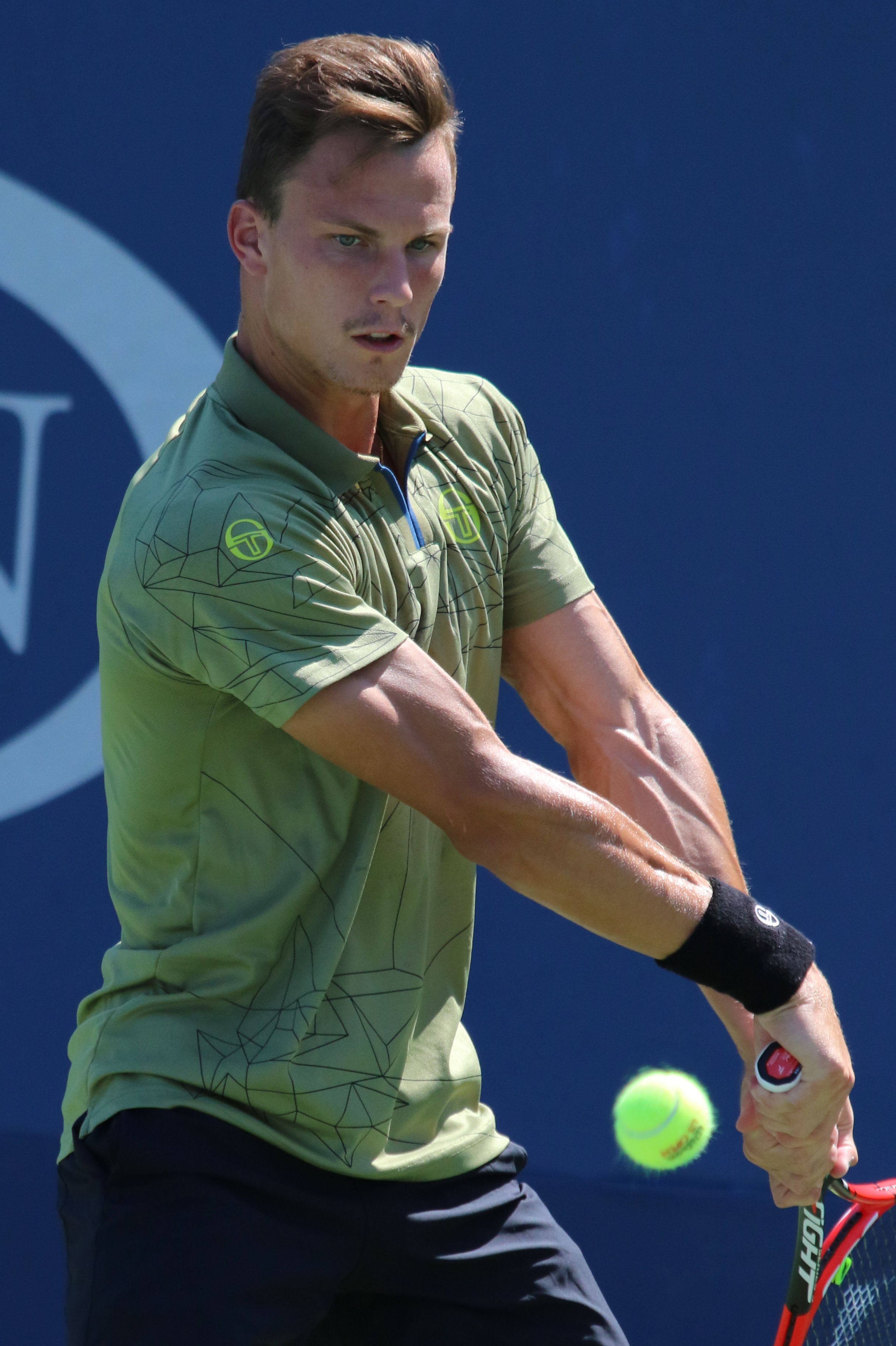 Fucsovics US16 (10)